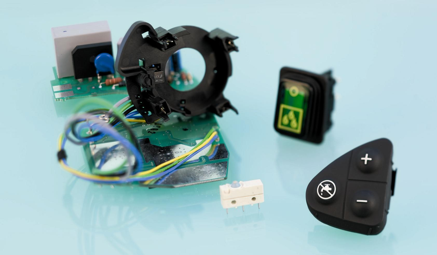 Reinigungs- und Antriebstechnik